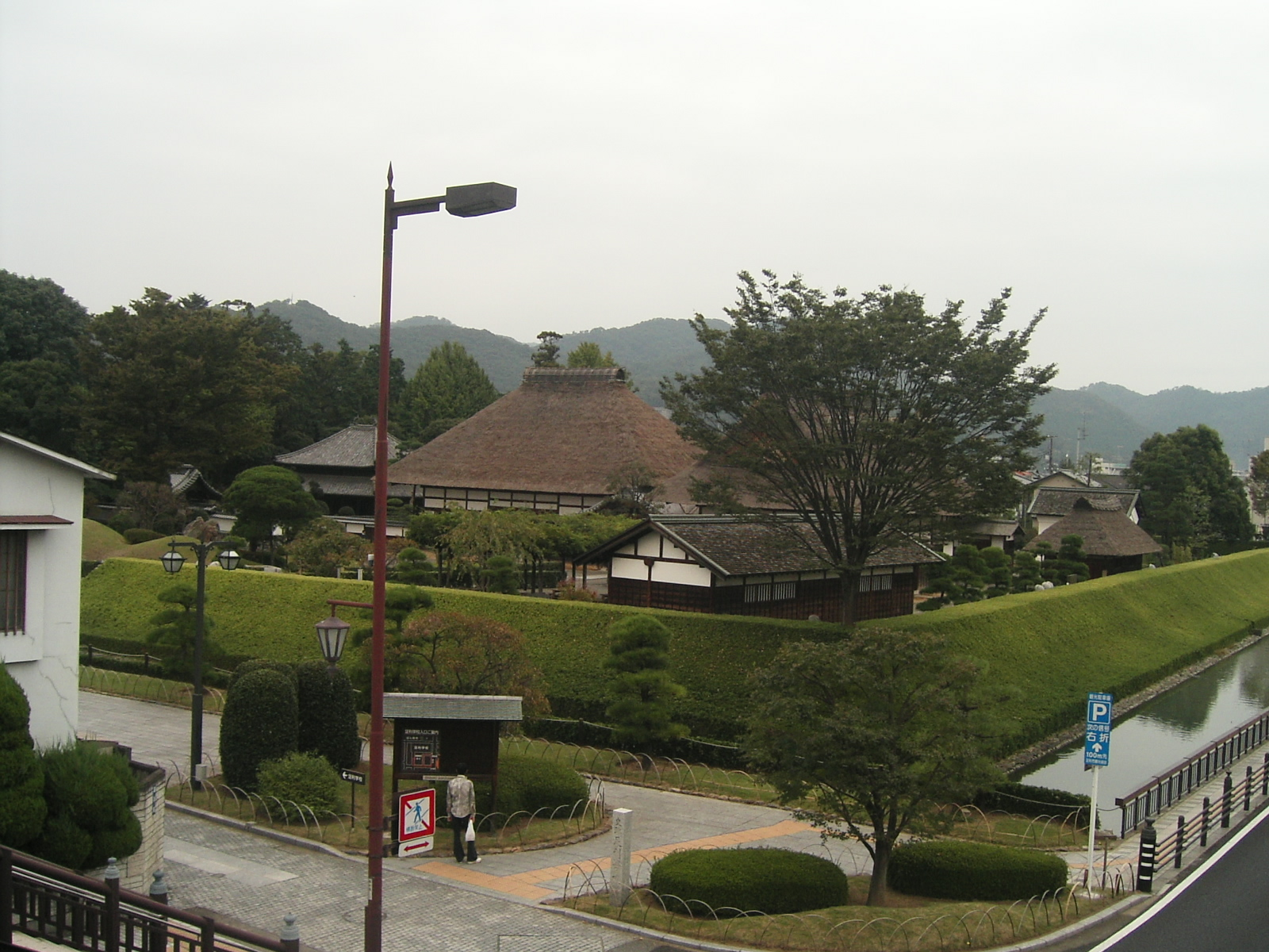 Ashikaga Gakkou in Ashikaga city,Tochigi,Japan 足利学校 全景